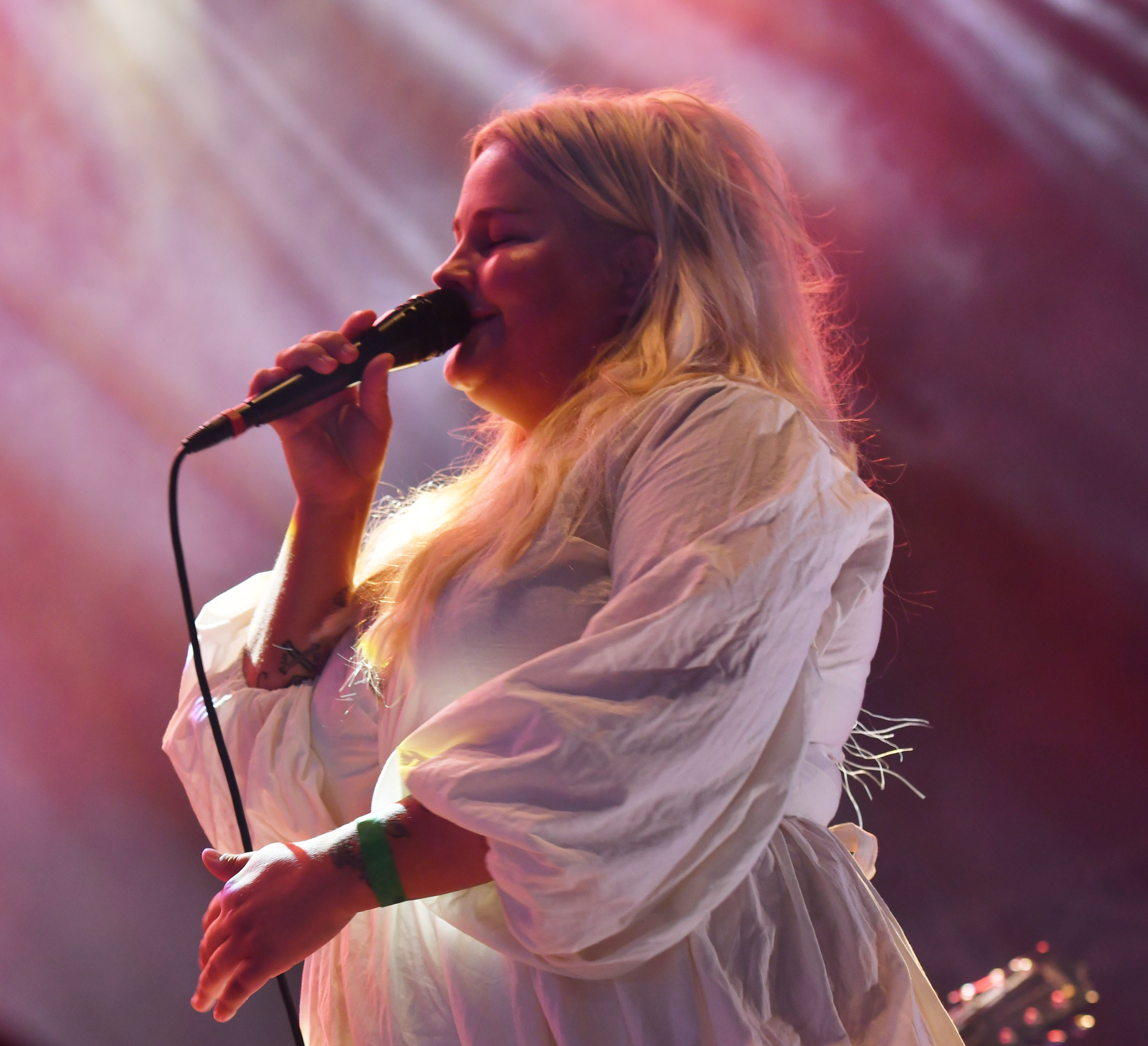 Sarah Klang på Malmöfestivalen 2018.